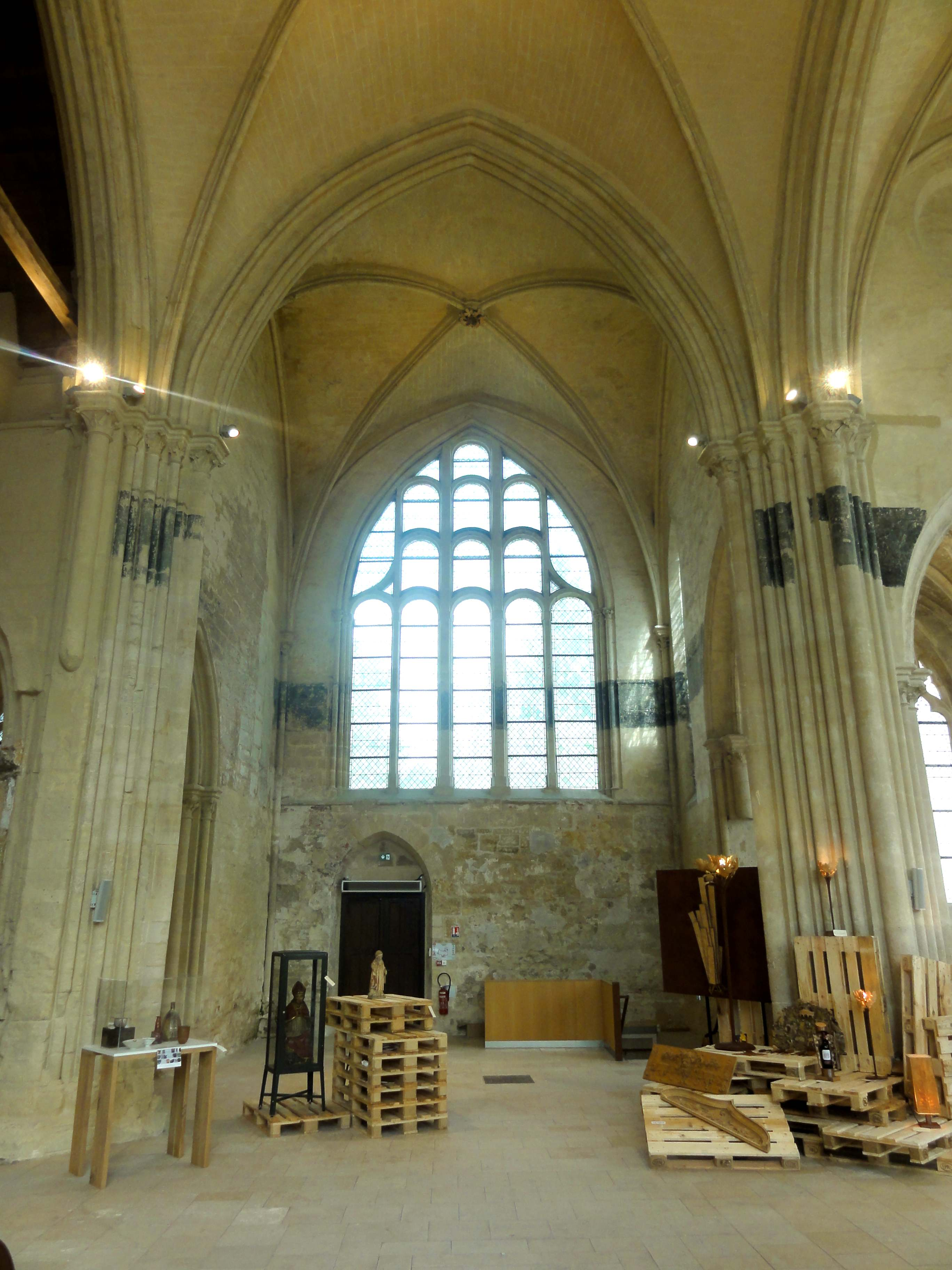 Intérieur de l'église - voir titre.